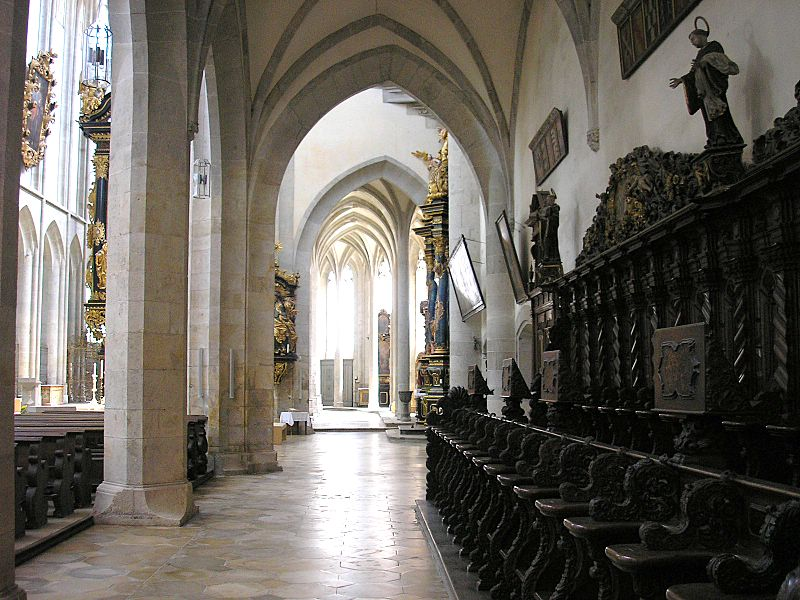 Klosterkirche Kaisheim (Landkreis Donau-Ries, Bayern). Nördliches Seitenschiff nach Osten. Eigene Aufnahme, Juli 2006 / Abbey church Kaisheim near Donauwoerth, Bavaria, Germany. North aisle of the nave looking east. Own photo, July 2006